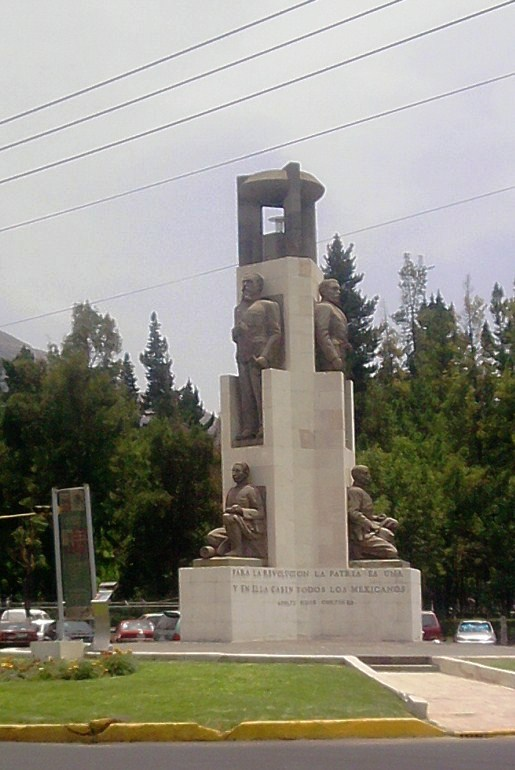 Monumento ubicado entre Av. Revolución y Av. Madero. Conmemorativo de la Revolución Mexicana en Pachuca de Soto, Hidalgo, México.